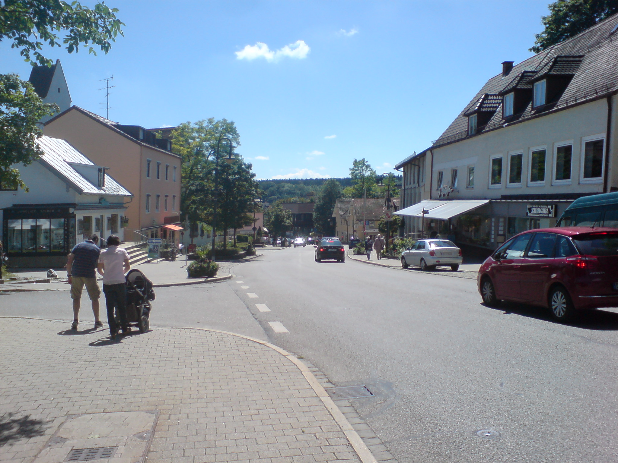 Ortszentrum von Gauting